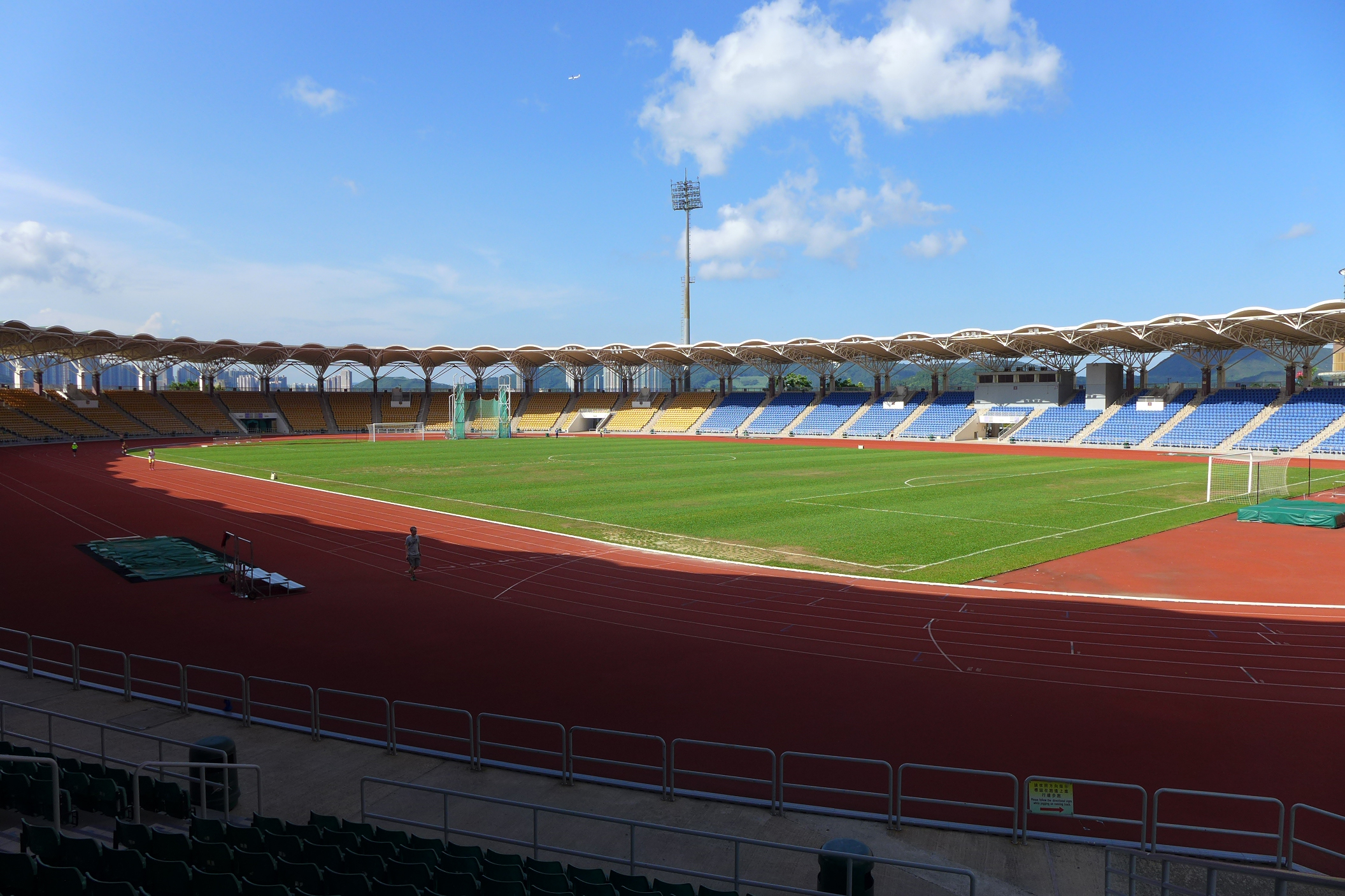 Siu Sai Wan Sports Ground